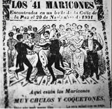 periodico del escandalo de ignacio de la torre y mier